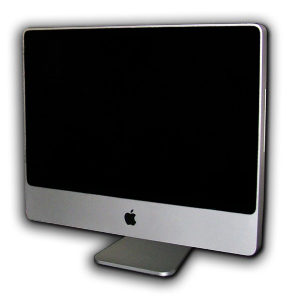 Núverandi 2007 Intel iMac.